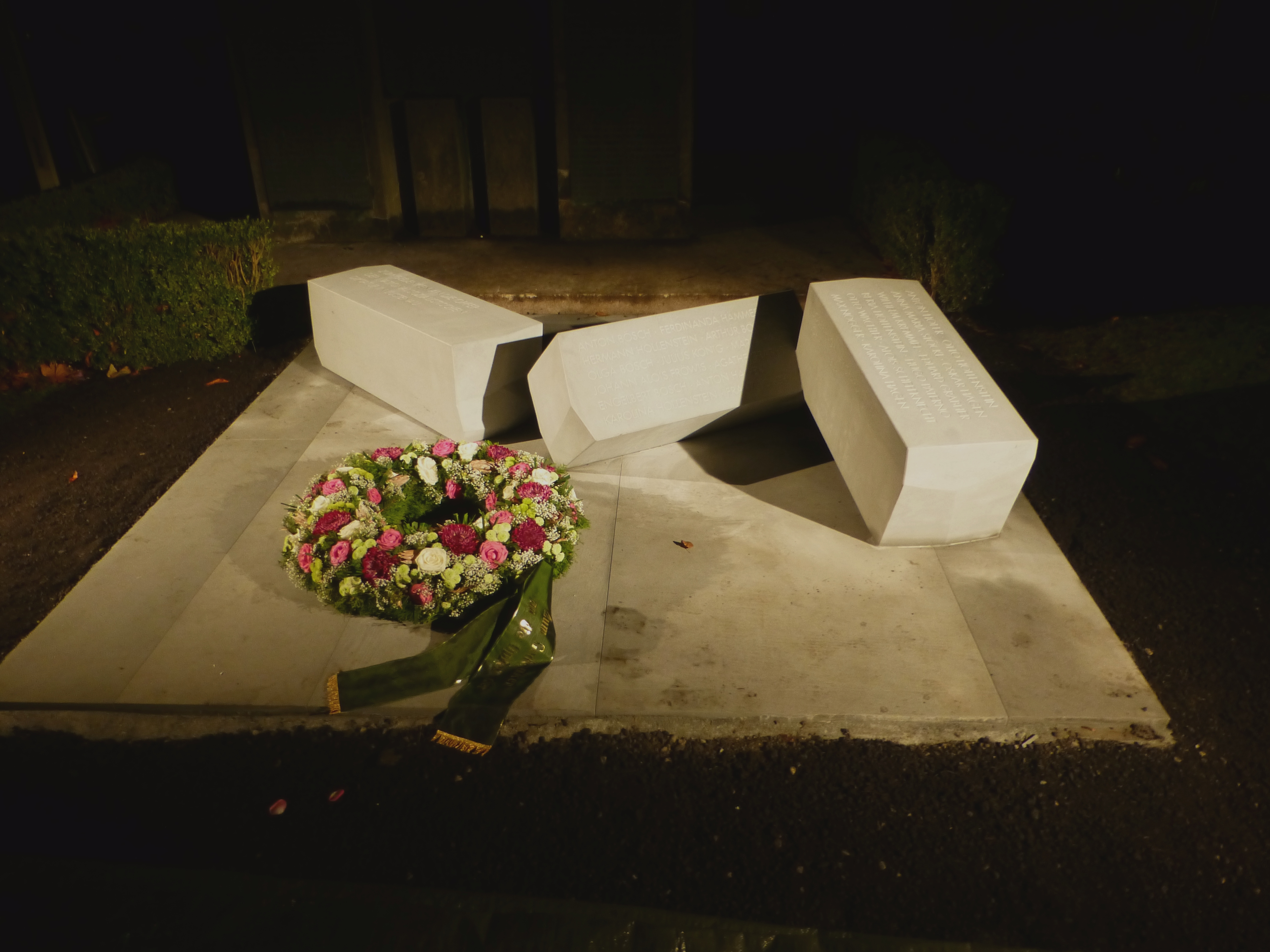 Die Gedenkstätte für die Opfer der nationalsozialistischen Diktatur in Lustenau wurde vom Lustenauer Bildhauer Udo Rabensteiner gestaltet. Sie zeigt die Namen der 2013 bekannten 28 Lustenauer Opfer der NS-Diktatur. Das Denkmal ist bewusst so angelegt, dass weitere Namen hinzugefügt werden können, falls zukünftige Forschungen noch weitere Opfer ans Tageslicht bringen. Das Bild wurde unmittelbar nach der feierlichen Enthüllung gemacht, die am 9. November 2013, am 75. Jahrestag der Reichspogromnacht, stattfand.